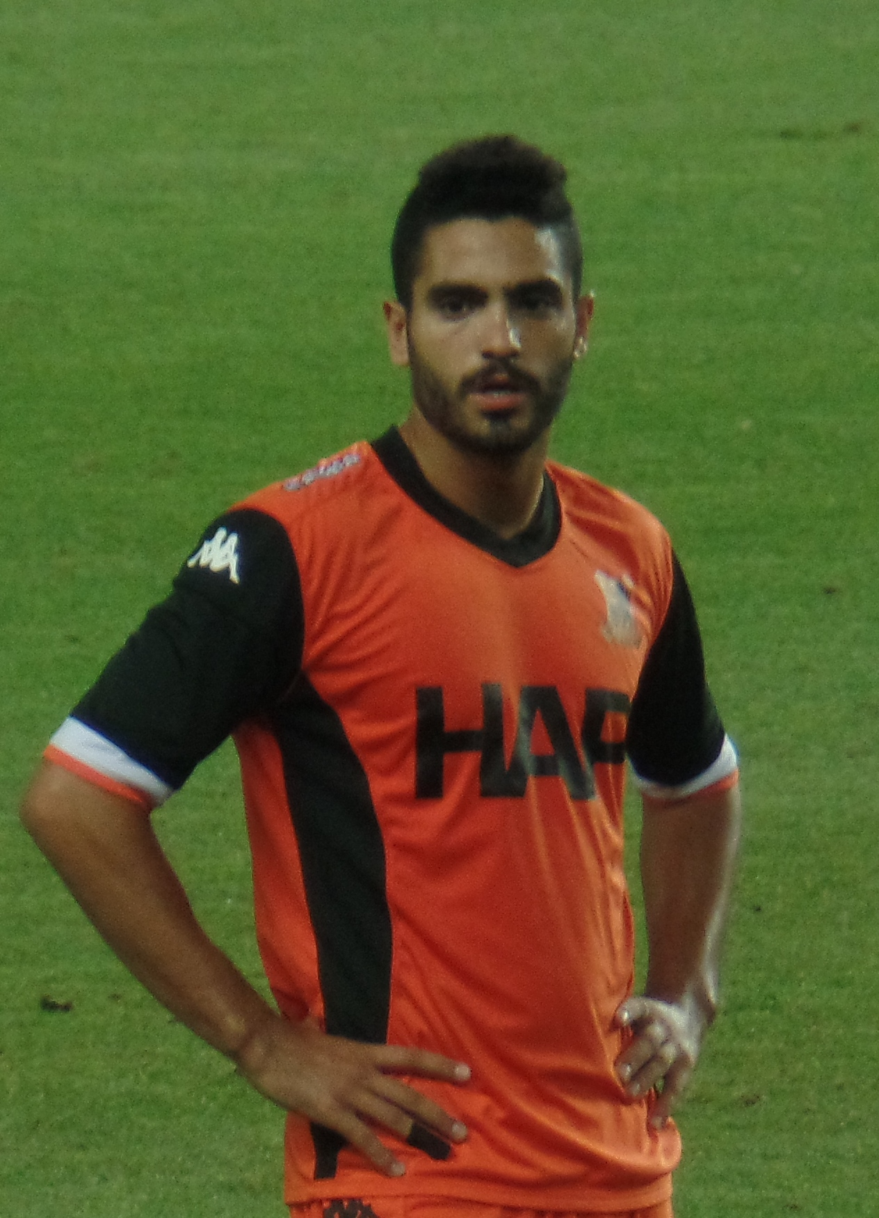 שחקן בני יהודה ת"א 2018